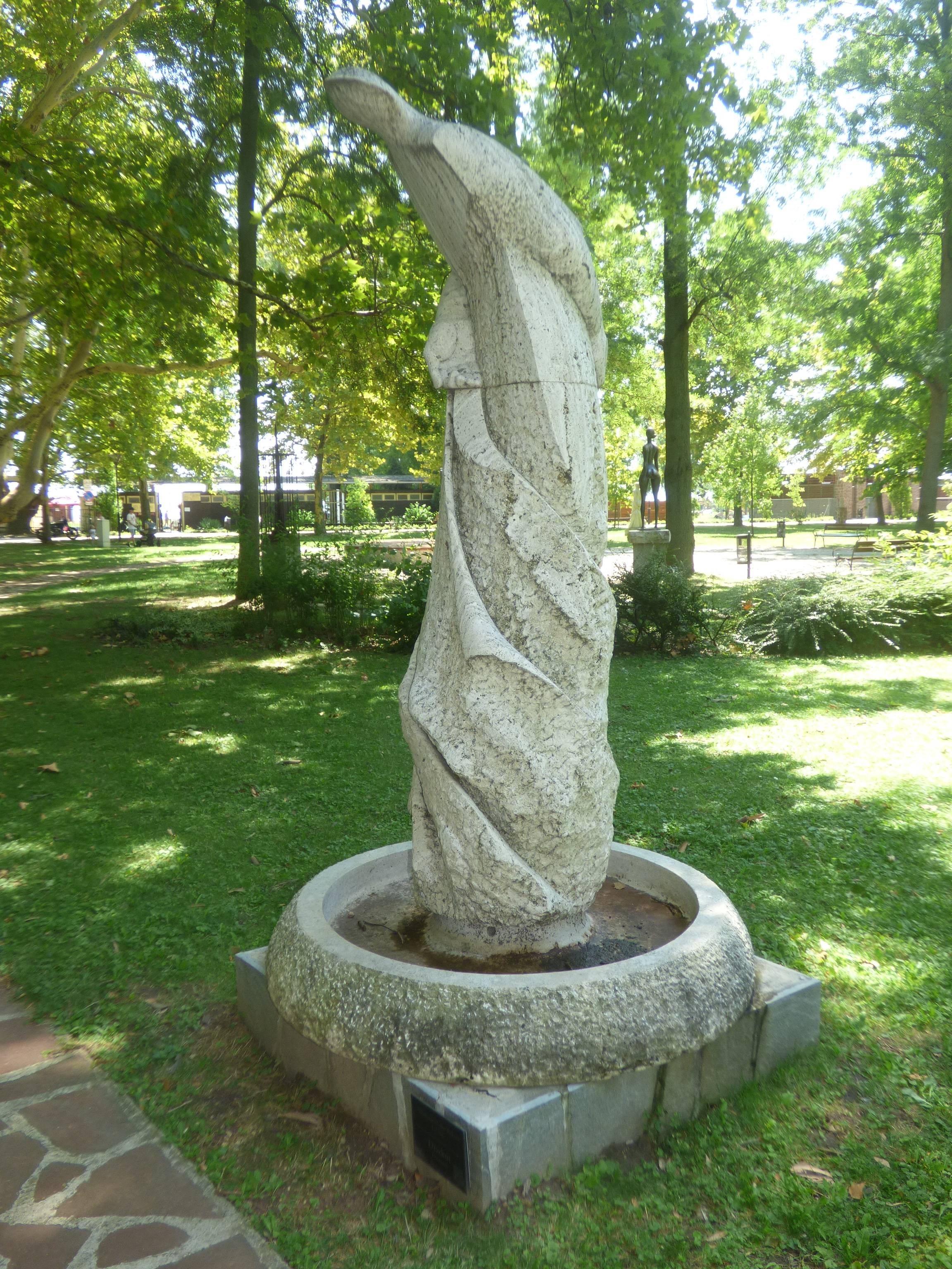 Csíkszentmihályi Róbert Díszkútja a balatonalmádi szoborparkban